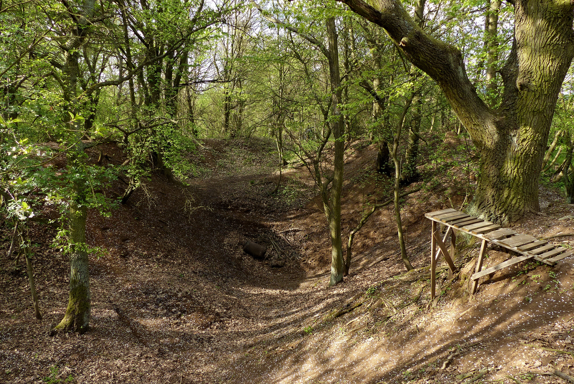 Horka u Nosálova – lom